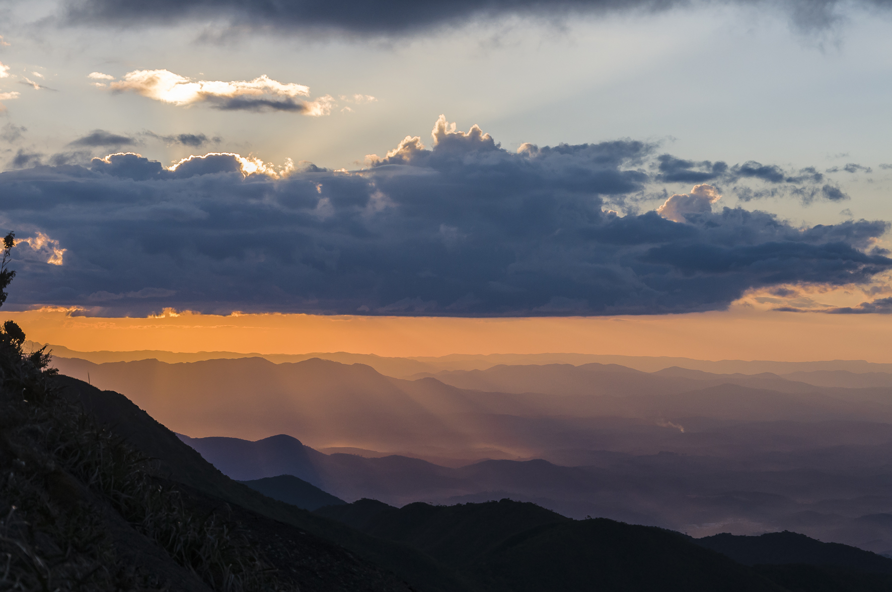 O dia chegando ao fim na serra da mantiqueira